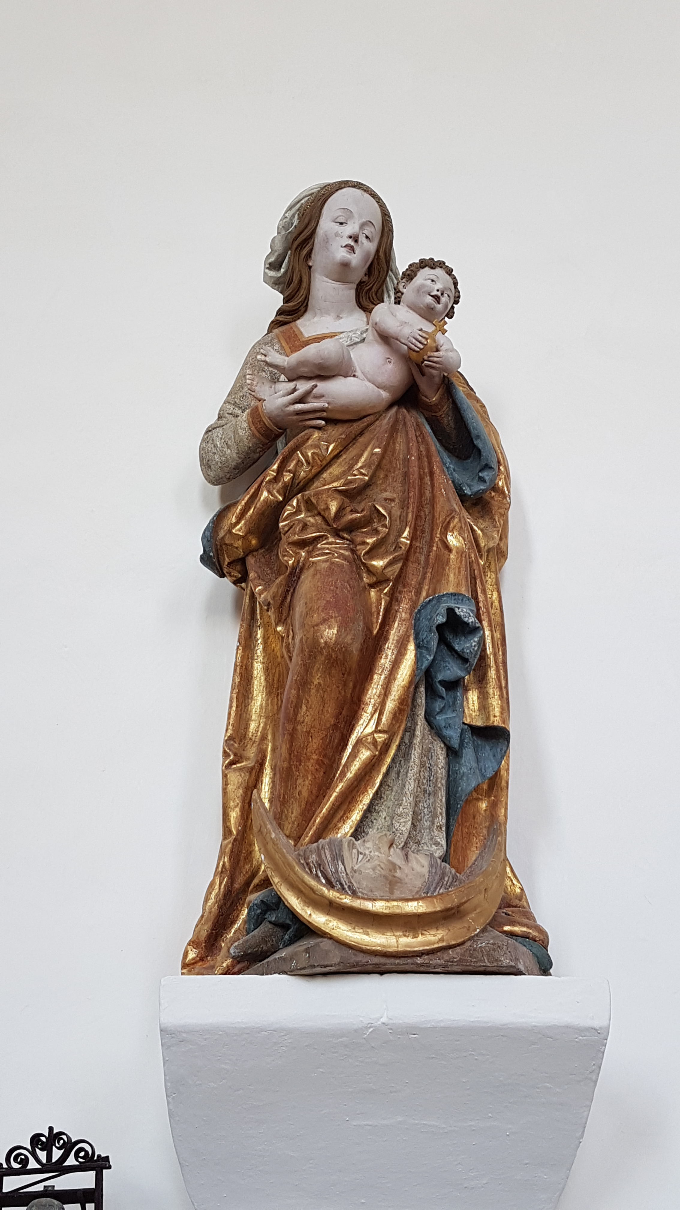 St. Georg (Auerberg), spätgotische Madonna im Chor.